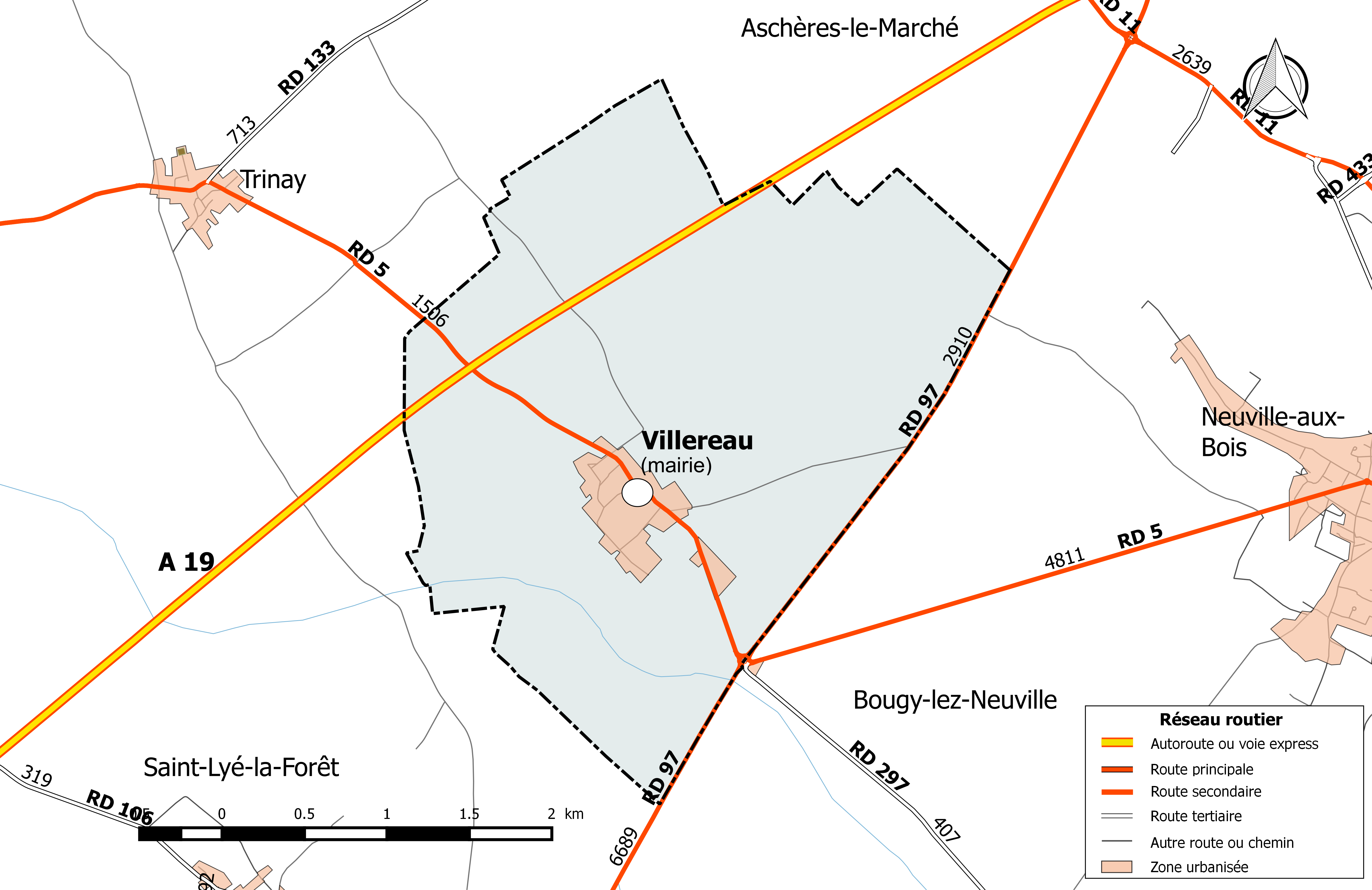 Carte du réseau routier de la commune de Villereau (Loiret).